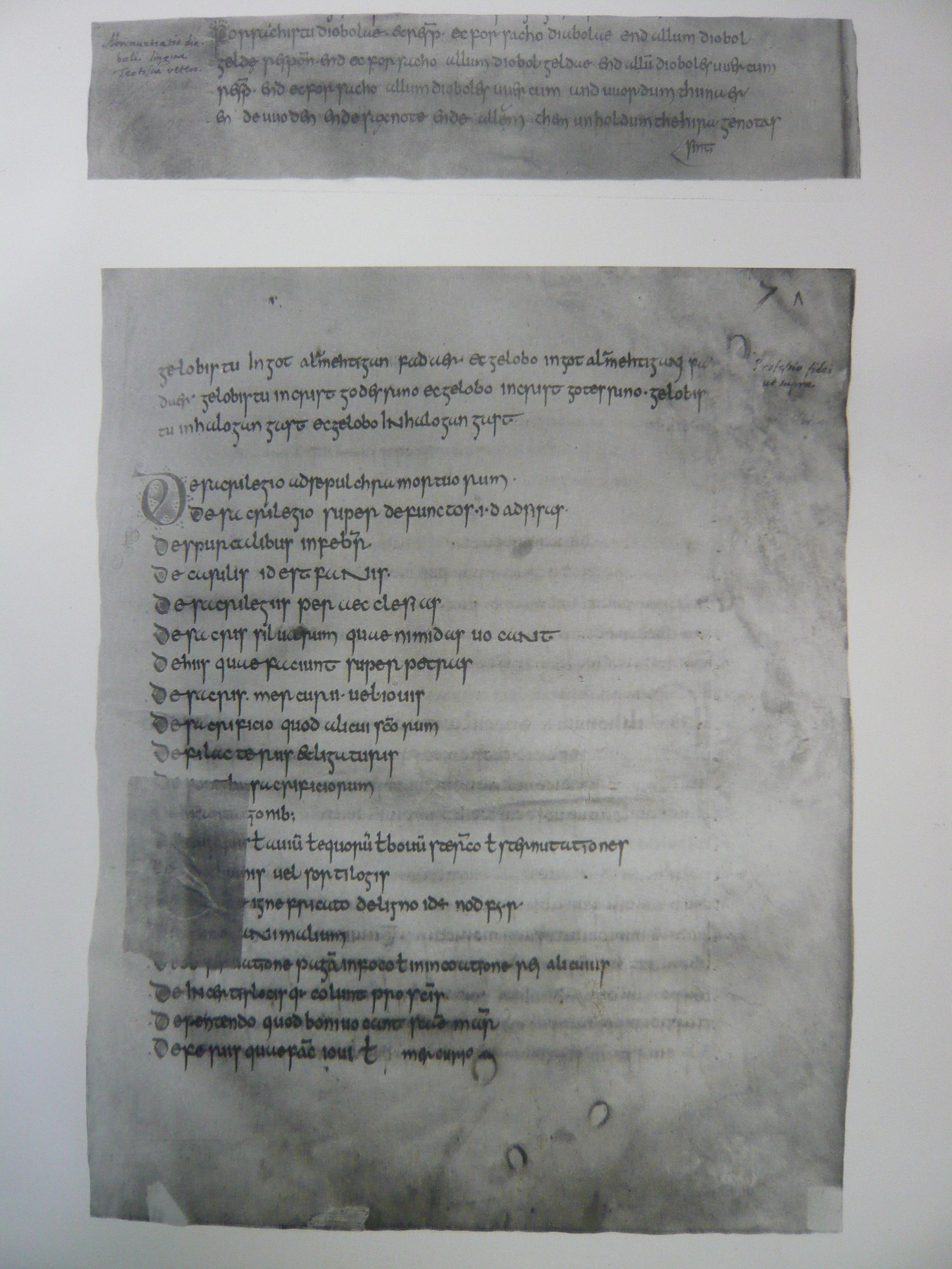 facsimile from: Johan H. Gallée (Hg.), Altsächsische Sprachdenkmäler, Facsimile Sammlung, Leiden 1895, Nr. 11a